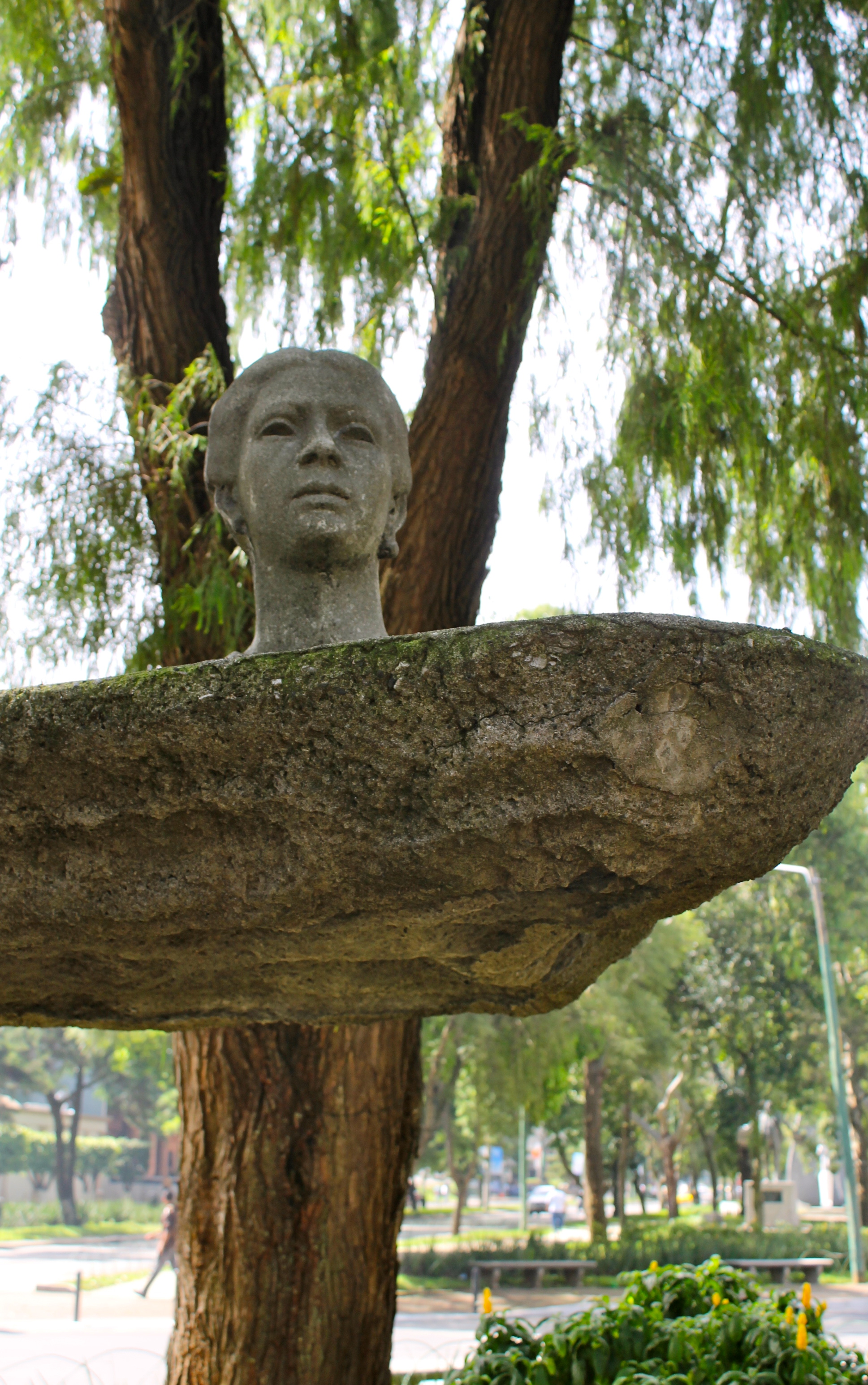 Monumento a Dolores Bedoya de Molina.